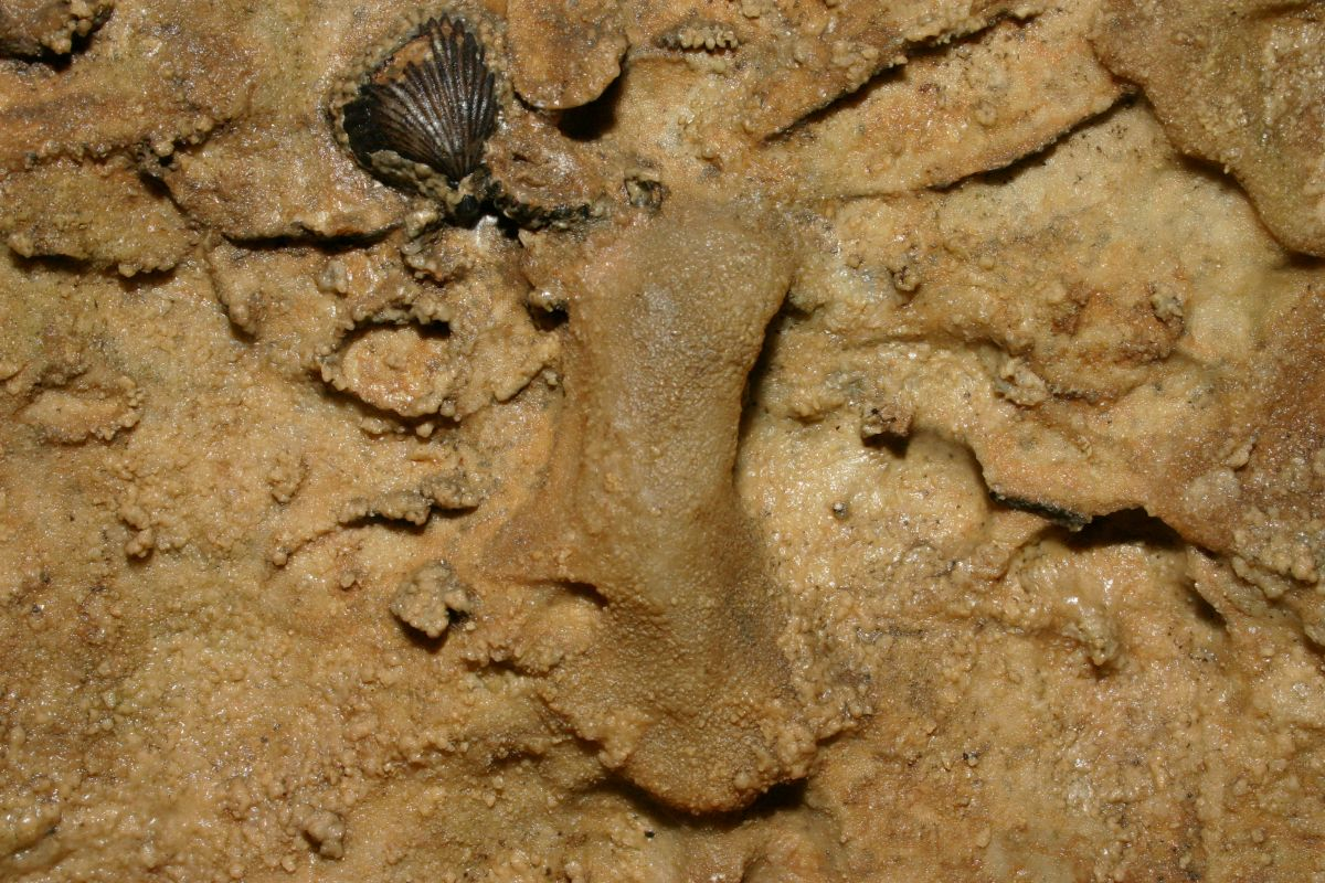 Binghöhle bei Streitberg